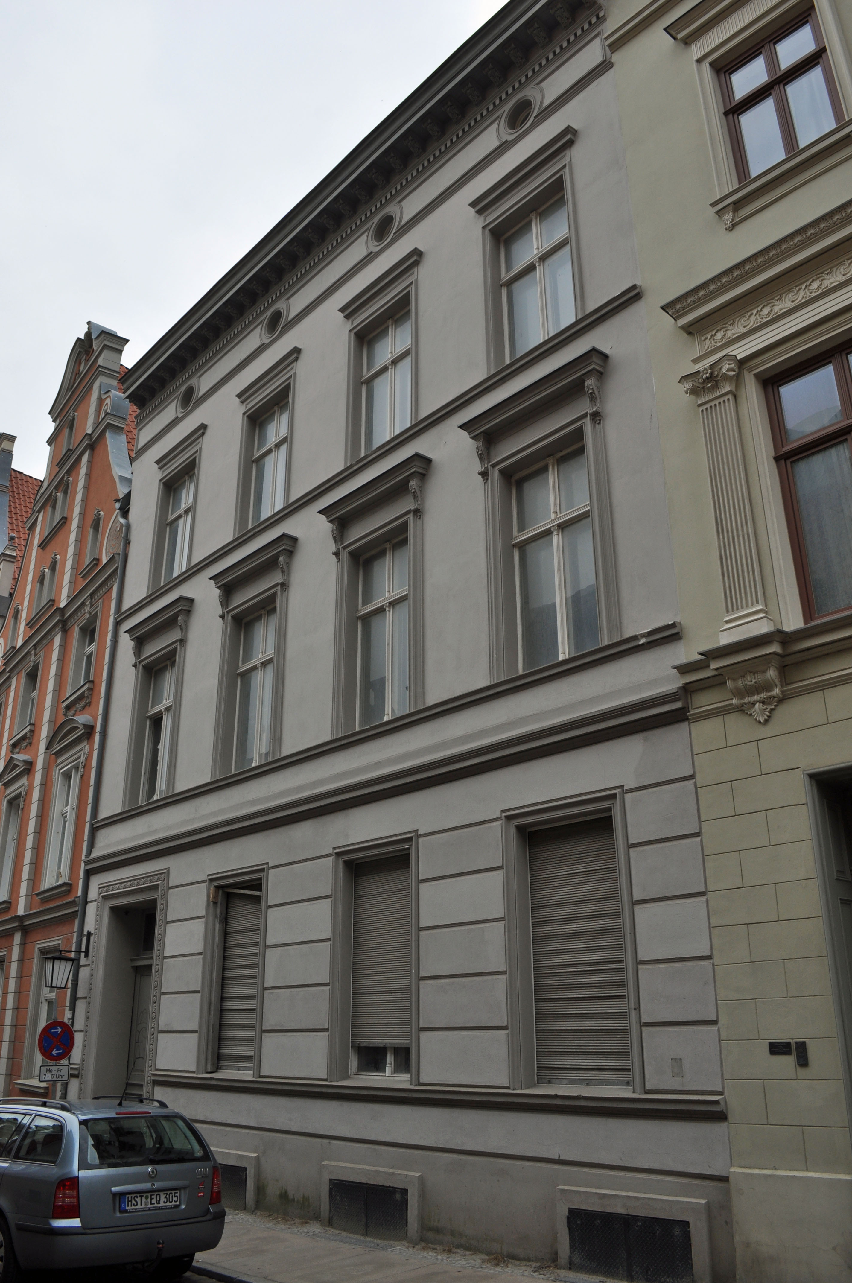 Gebäude bzw. Gebäudedetail in Stralsund. Straße und Hausnummer siehe Dateiname.